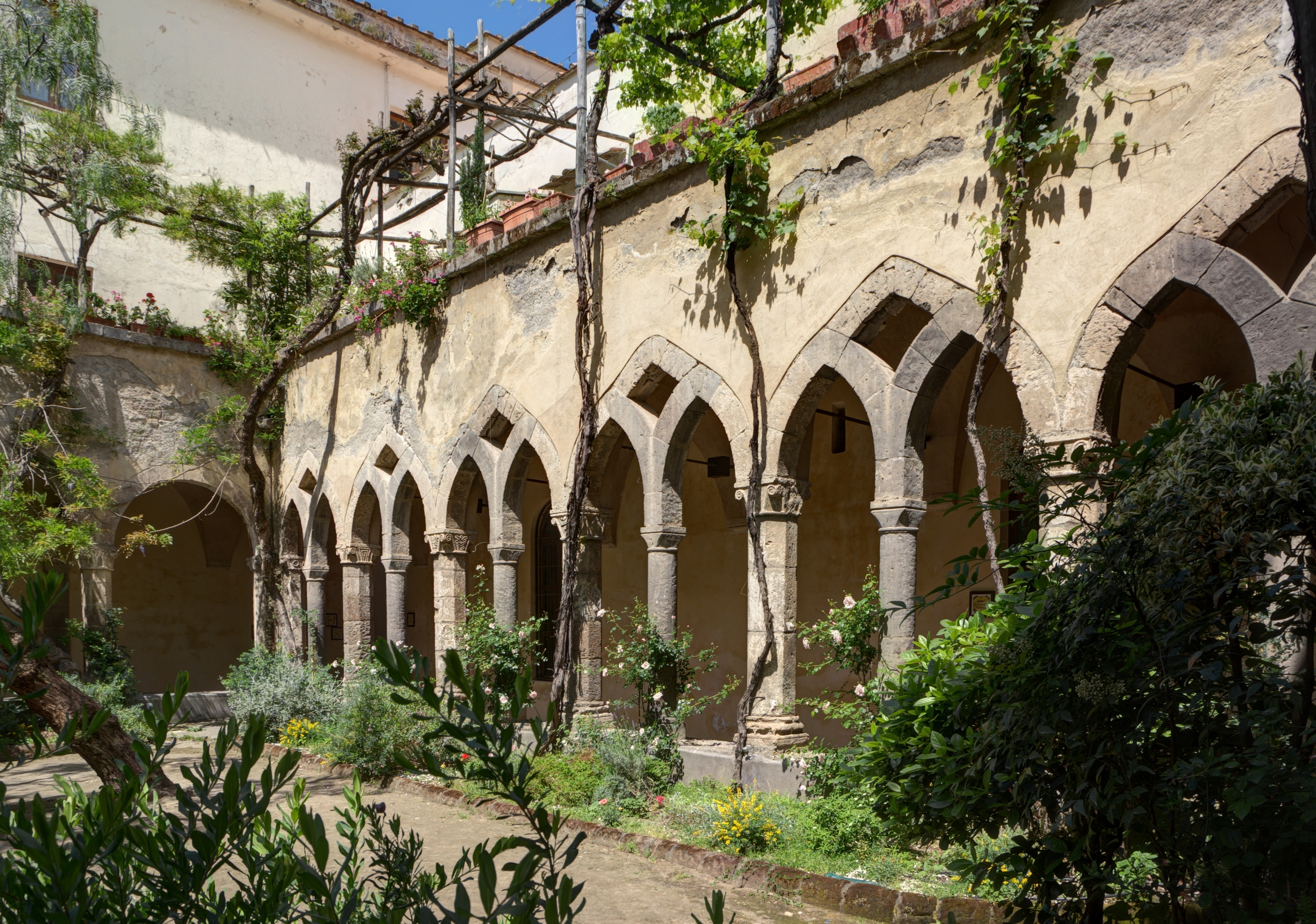 Sorrento, Chiostro di San Francesco